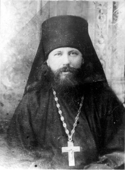 Никон старец Оптинский